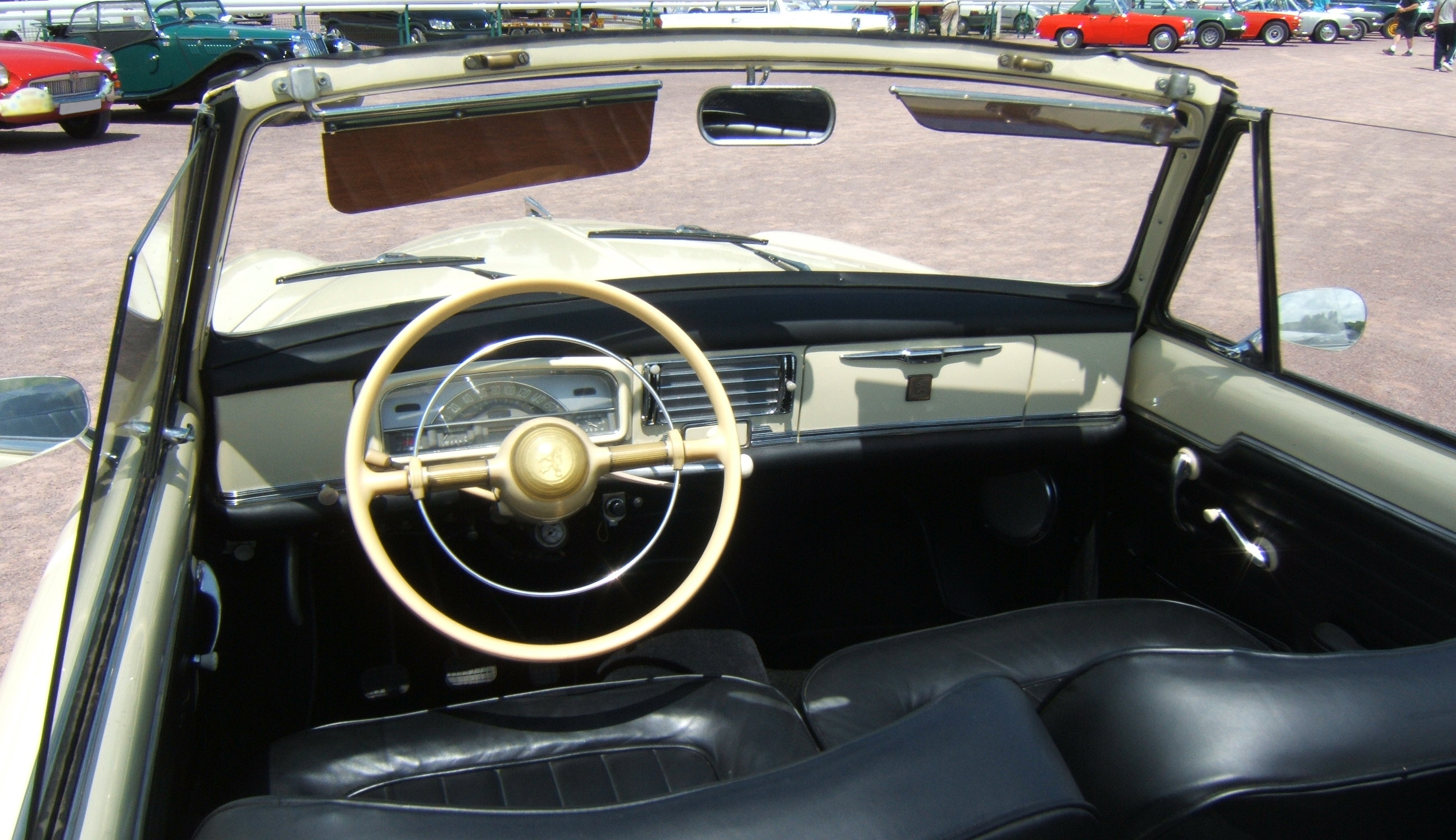 Tableau de bord et intérieur d'une Peugeot 403 cabriolet.